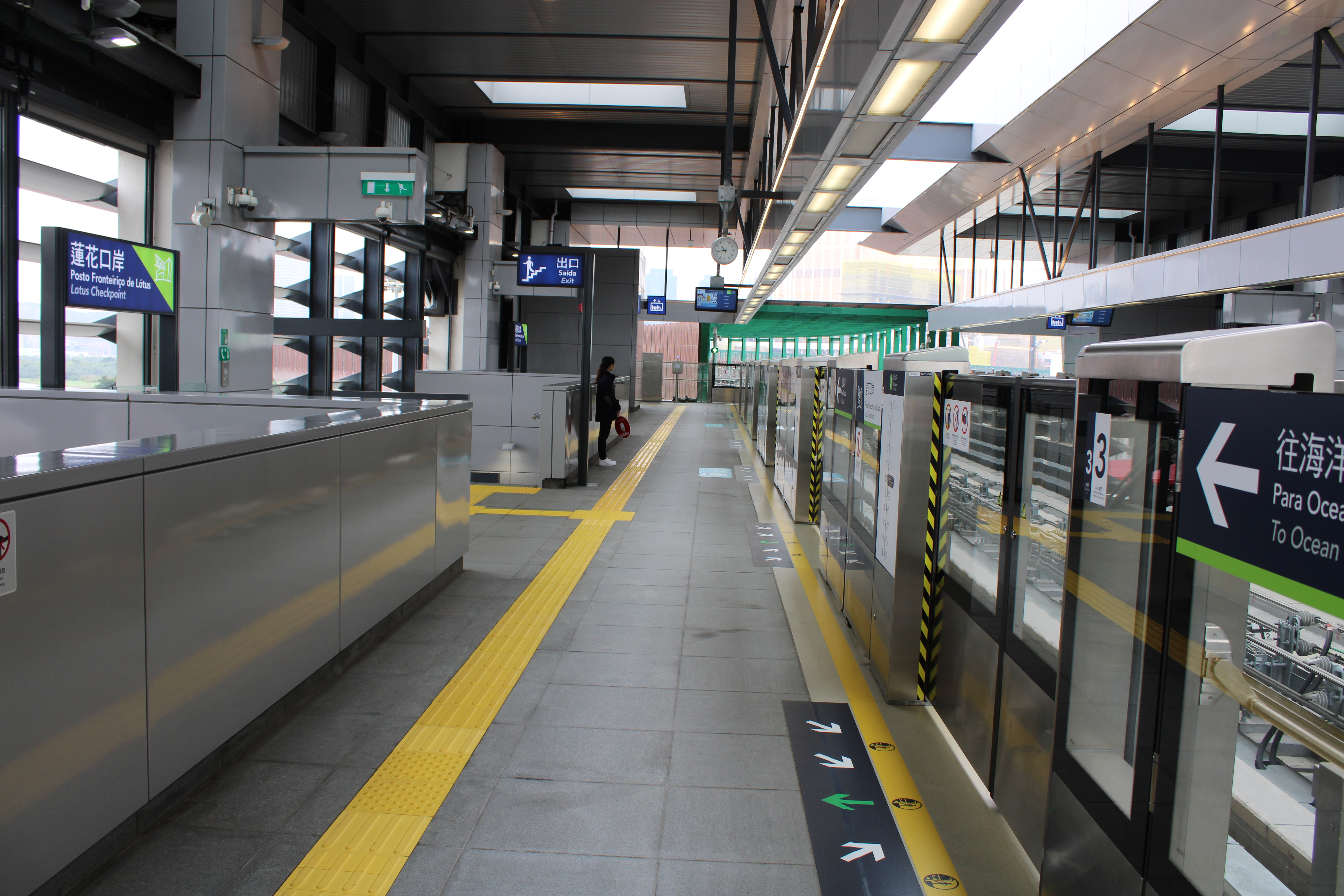 2019年12月的澳門輕軌氹仔線蓮花口岸站月臺。